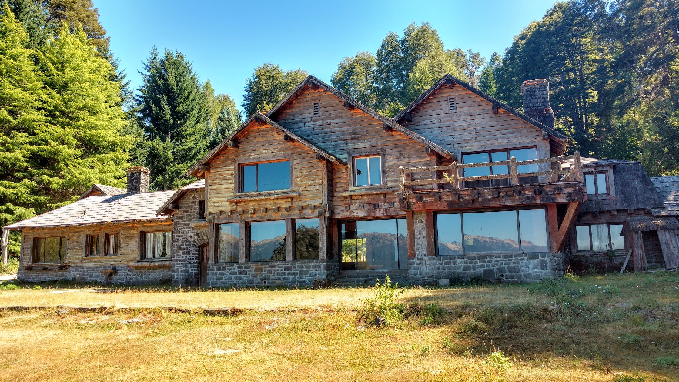 Casa Inalco, cerca de Villa La Angostura, Neuquén, Argentina